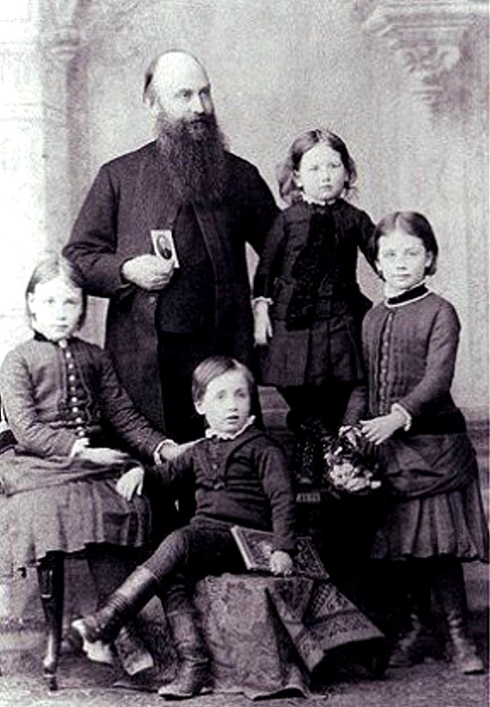 ויליאם הכלר וילדיו